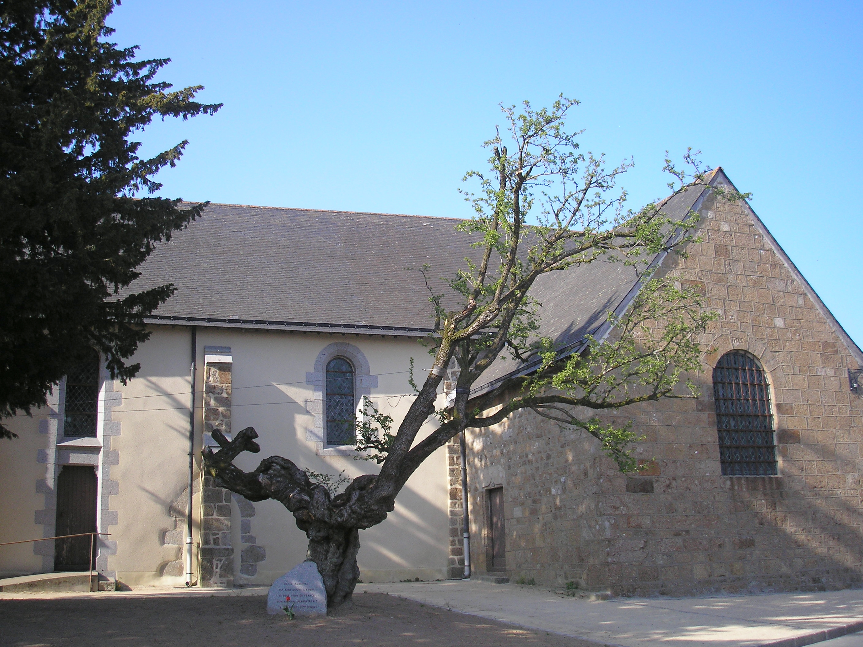 Saint-Mars-sur-la-Futaie (Pays de la Loire, France). L'aubépine considérée comme étant l'une des plus vieilles de France, sinon la plus vieille.